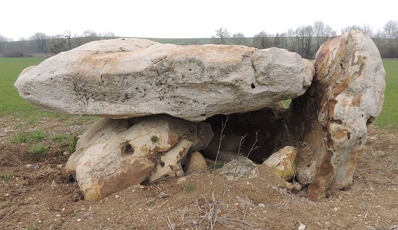 Dolmen avec une table bien horizontale mais reposant sur son orthostat droit, le gauche étant presque vertical mais à l'extérieur de la table, penché vers la droite de la photo comme l'autre, cad vers la gauche du dolmen. La face intérieure de l'orthostat gauche, à droite sur la photo est brunie.